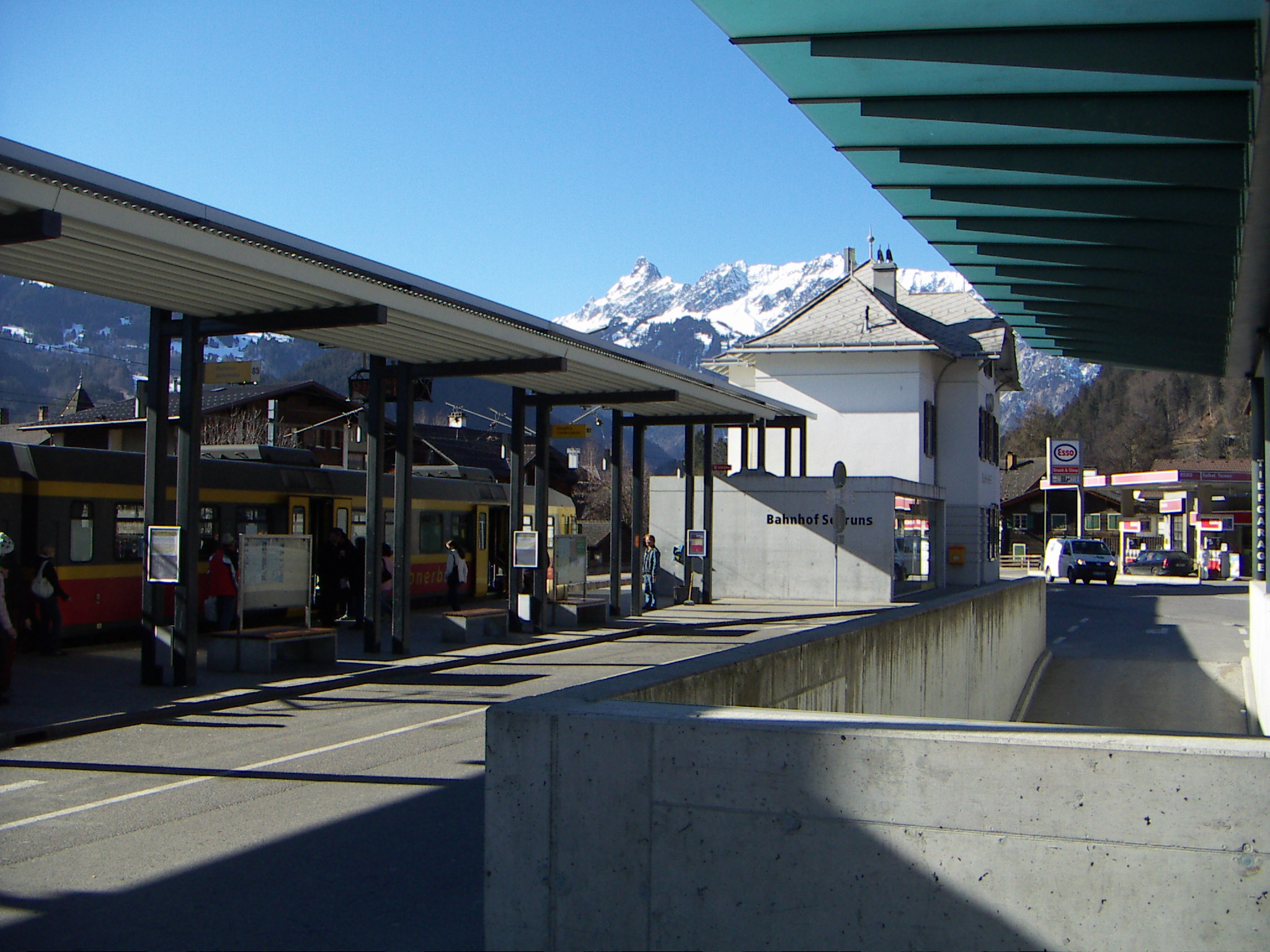 Bahnhof Schruns, Vandanser Steinwand im Hintergrund